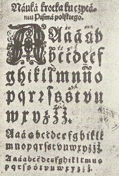 Najstarsze abecadło polskie, zbiory Cambridge Trinity College z XVI wieku